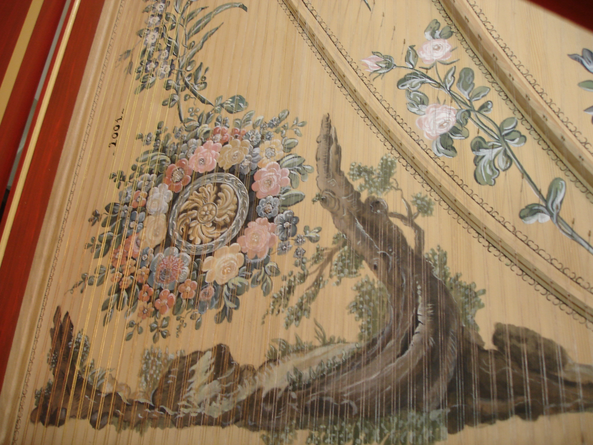 Harpsichord, made by Guillaume Rebinguet-Sudre (3)